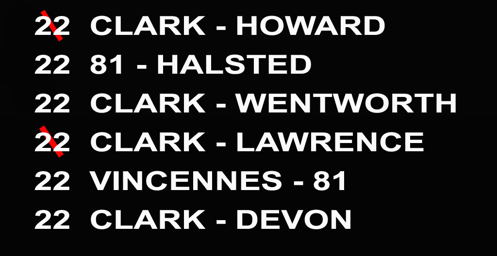 Zelfgemaakte media in Photoshop CS